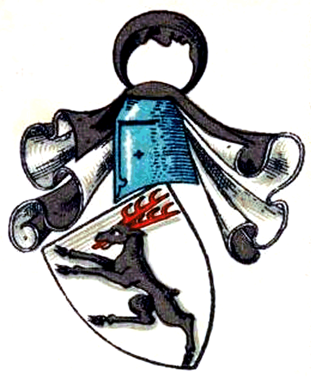 Wappen derer von Brauchitsch